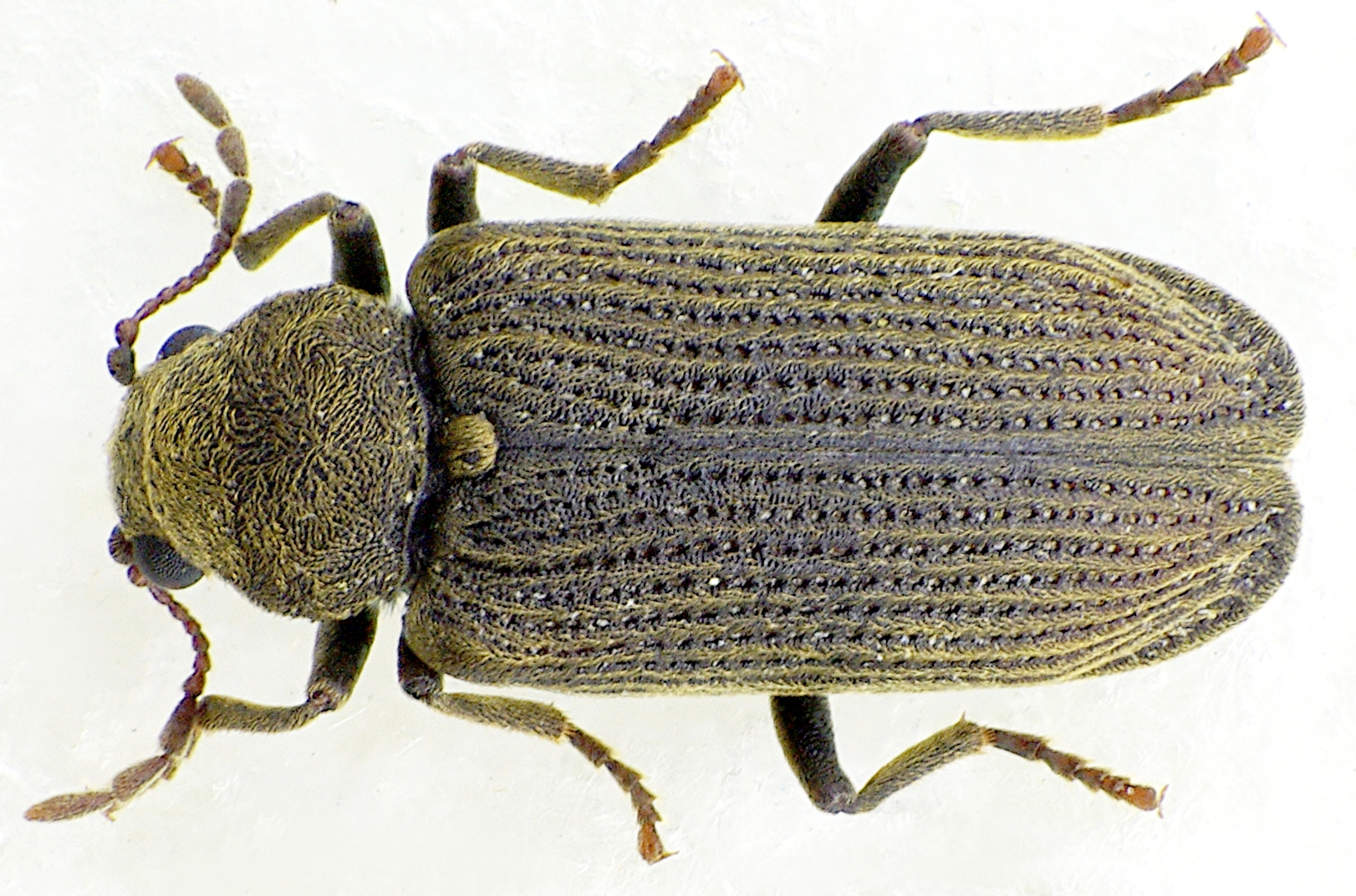 Grynobius planus aus Baden-Württemberg zwischen Rottweil und Tuttlingen, 700 m hoch, am 5. Mai 2914